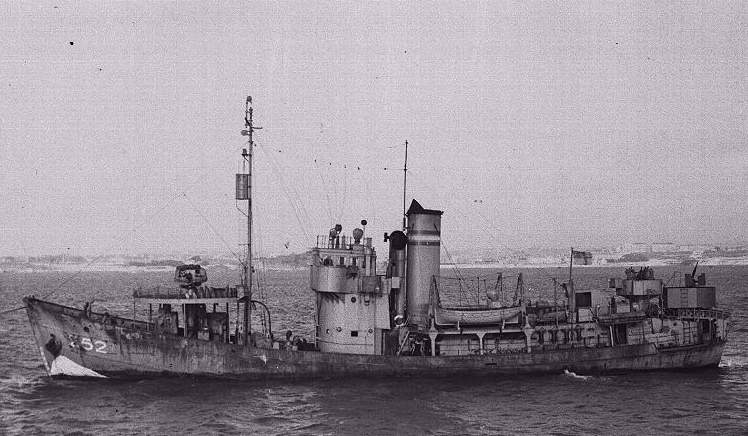 Der U-Boot-Jäger HMS Ullswater